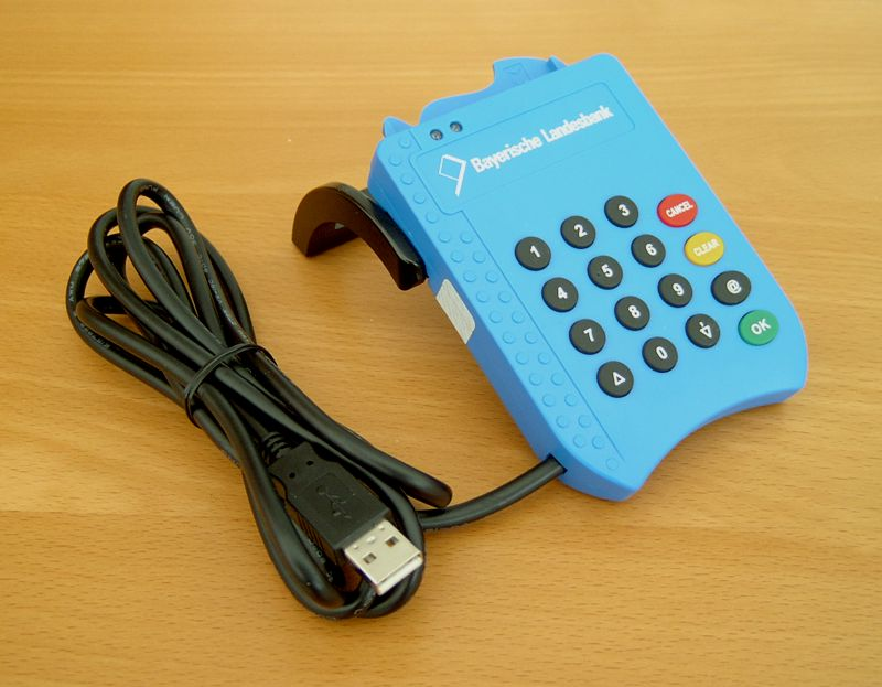 Reiner SCT cyberJack pinpad HBCI-Chipkartenleser (Sicherheitsklasse 2)